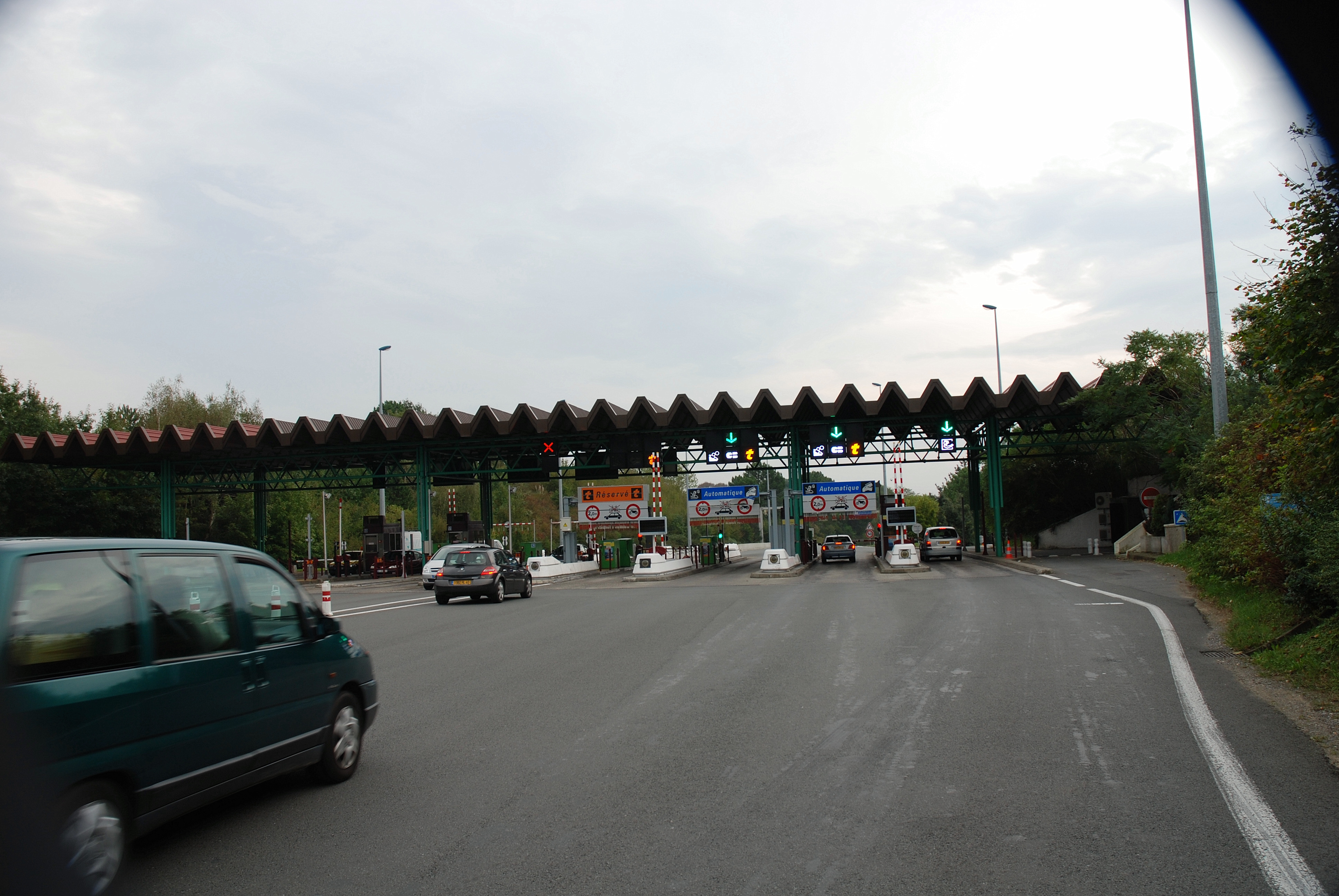 A63, péage de la Négresse à Biarritz. Photo prise le 17/10/06 par Harrieta171